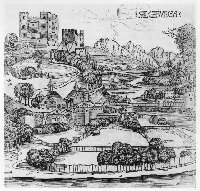 Trompeterschlössel